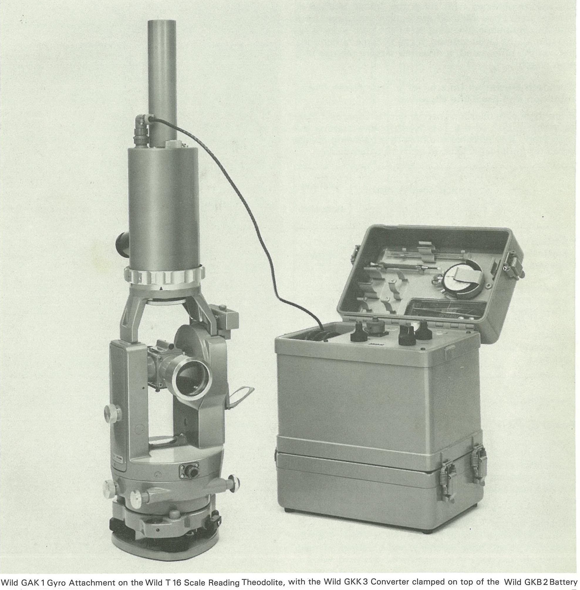 Комплект Теодолит Wild T16, жироприставка Wild GAK1, преобразувател и четящо устройство Wild GKK3 върху батерия Wild GKB2